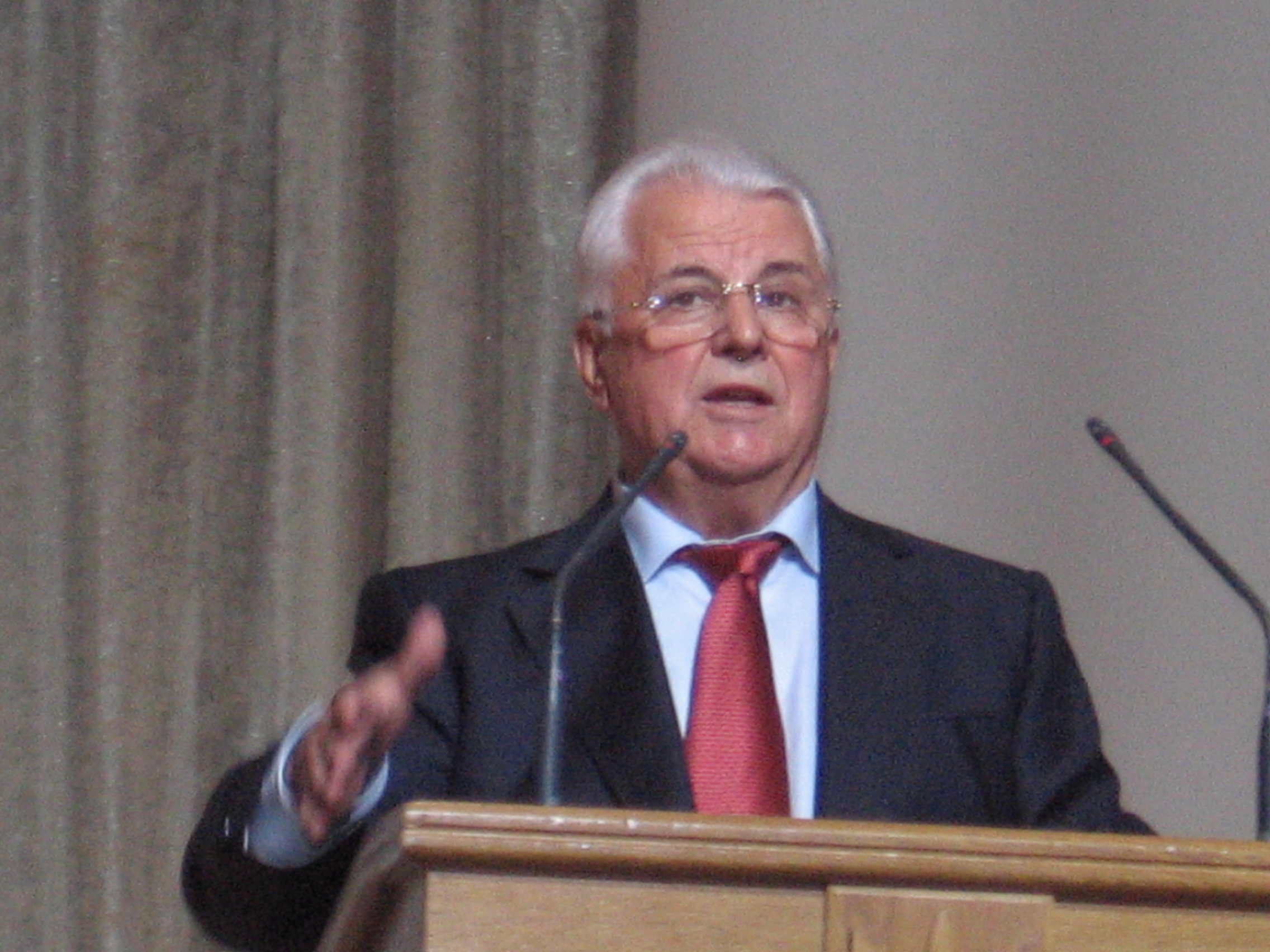 Кравчук Л.М.